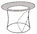 Использование вставного клапана в трюке "Кролик в цилиндре"